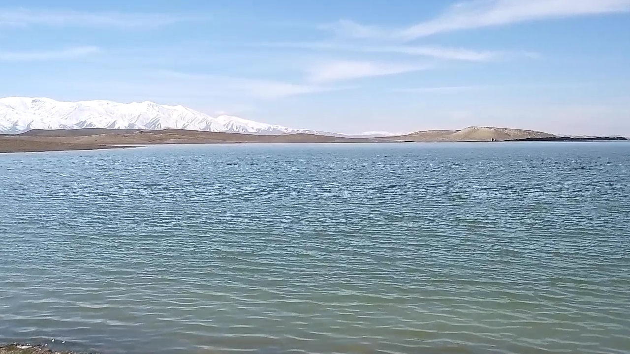 عید نوروز سال 94